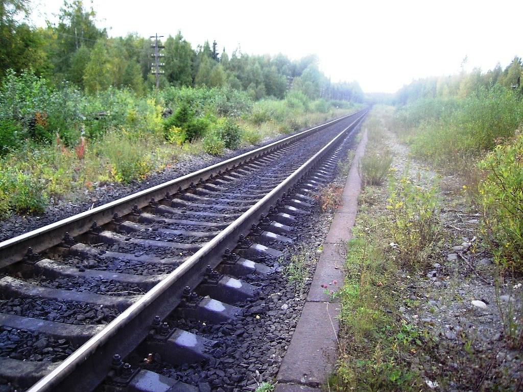 Пирттипохья